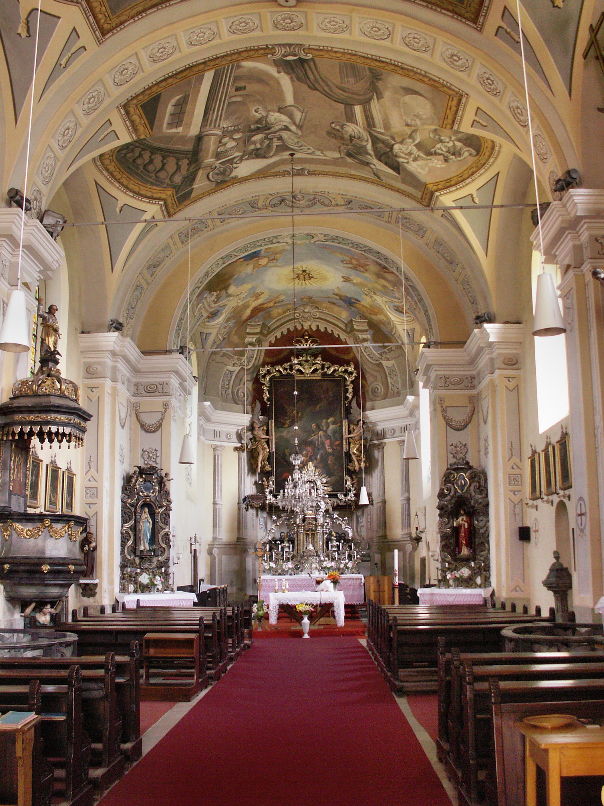 Vilémov, okres Havlíčků Brod, interiér kostela svatého Václava